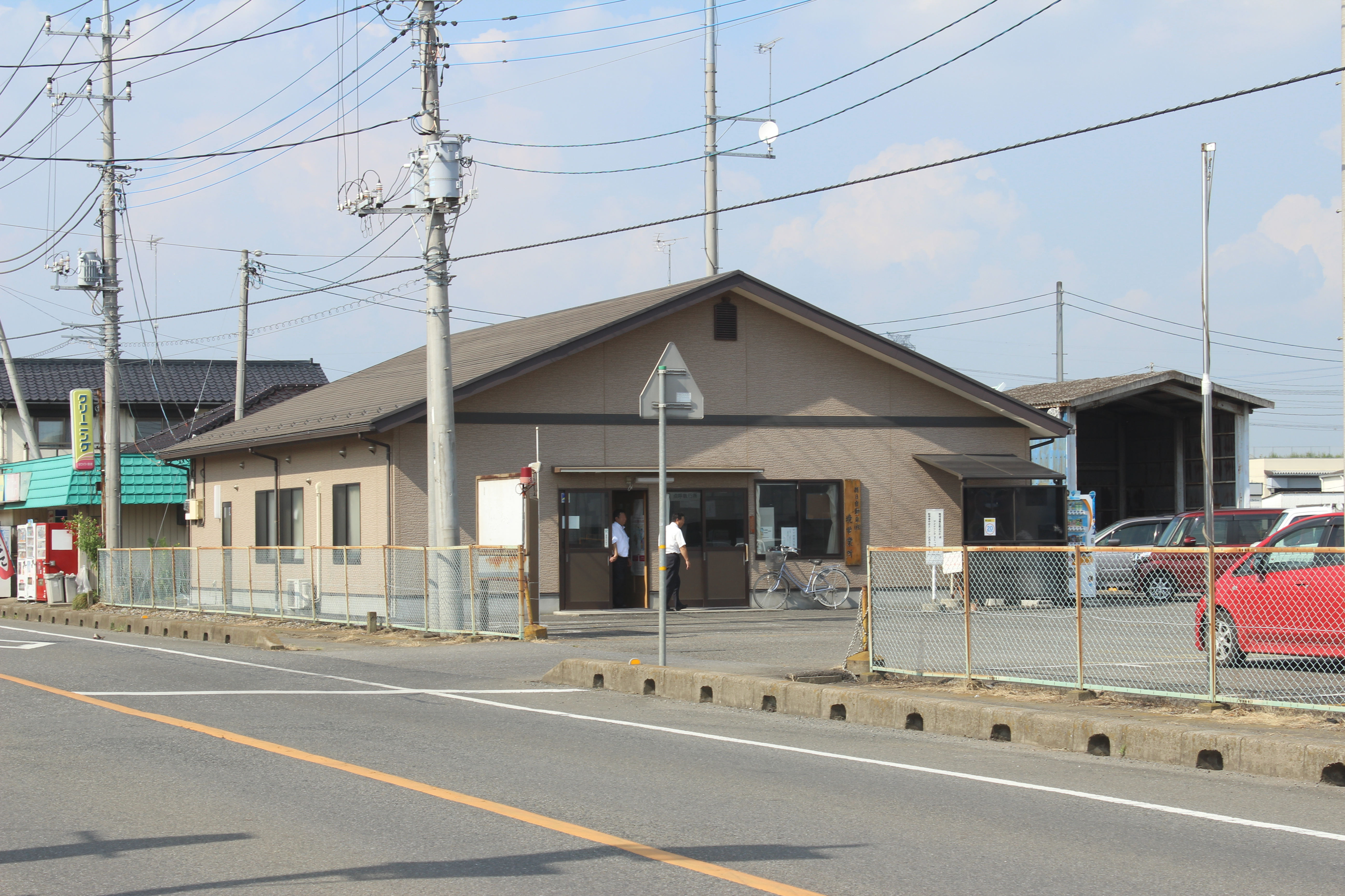 朝日自動車 境営業所（茨城県猿島郡境町大字長井戸276-1、加工済み）